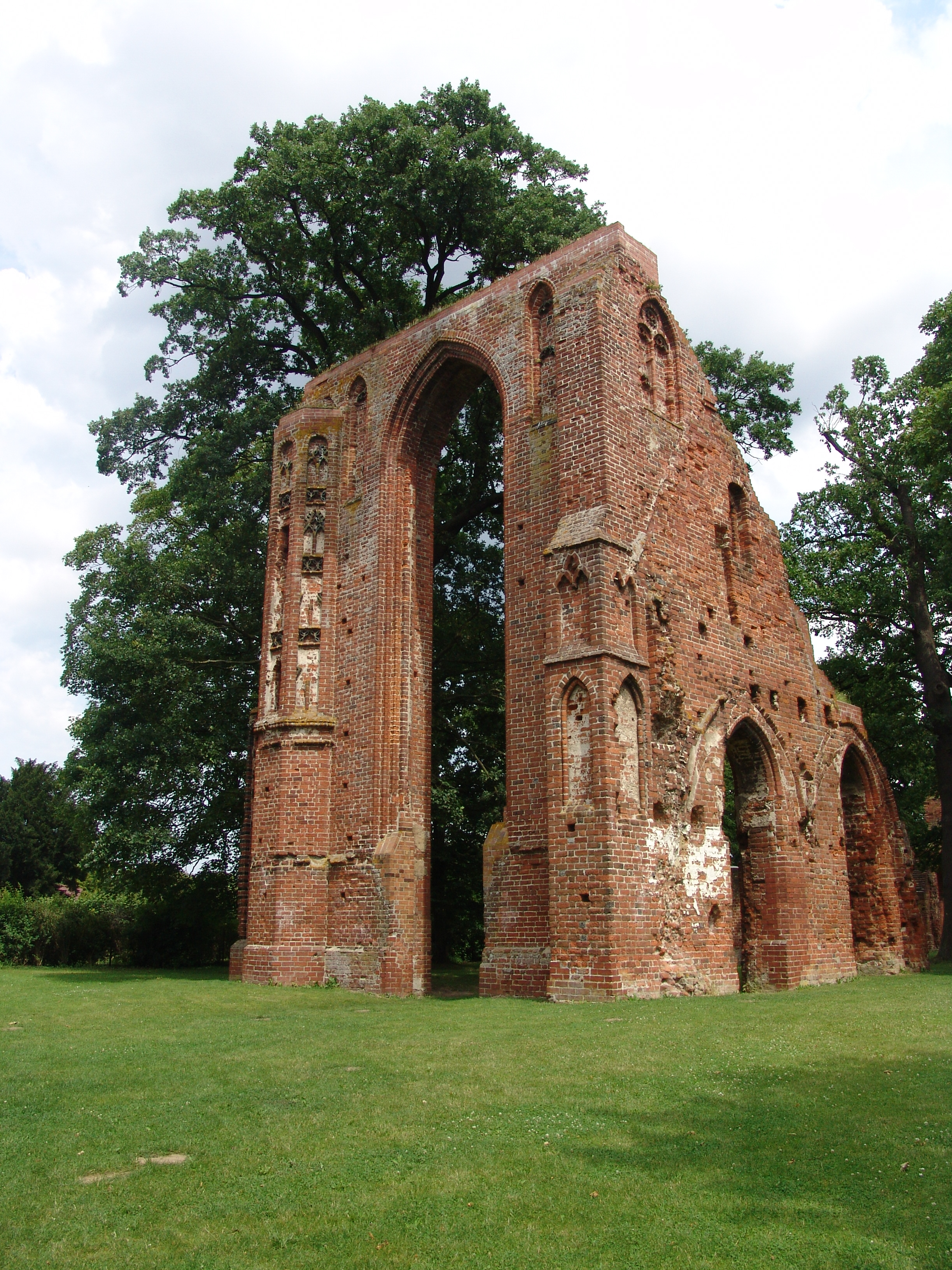 Klosteruine Elenda: Westende des Kirchenschiffs von Südwesten gesehen